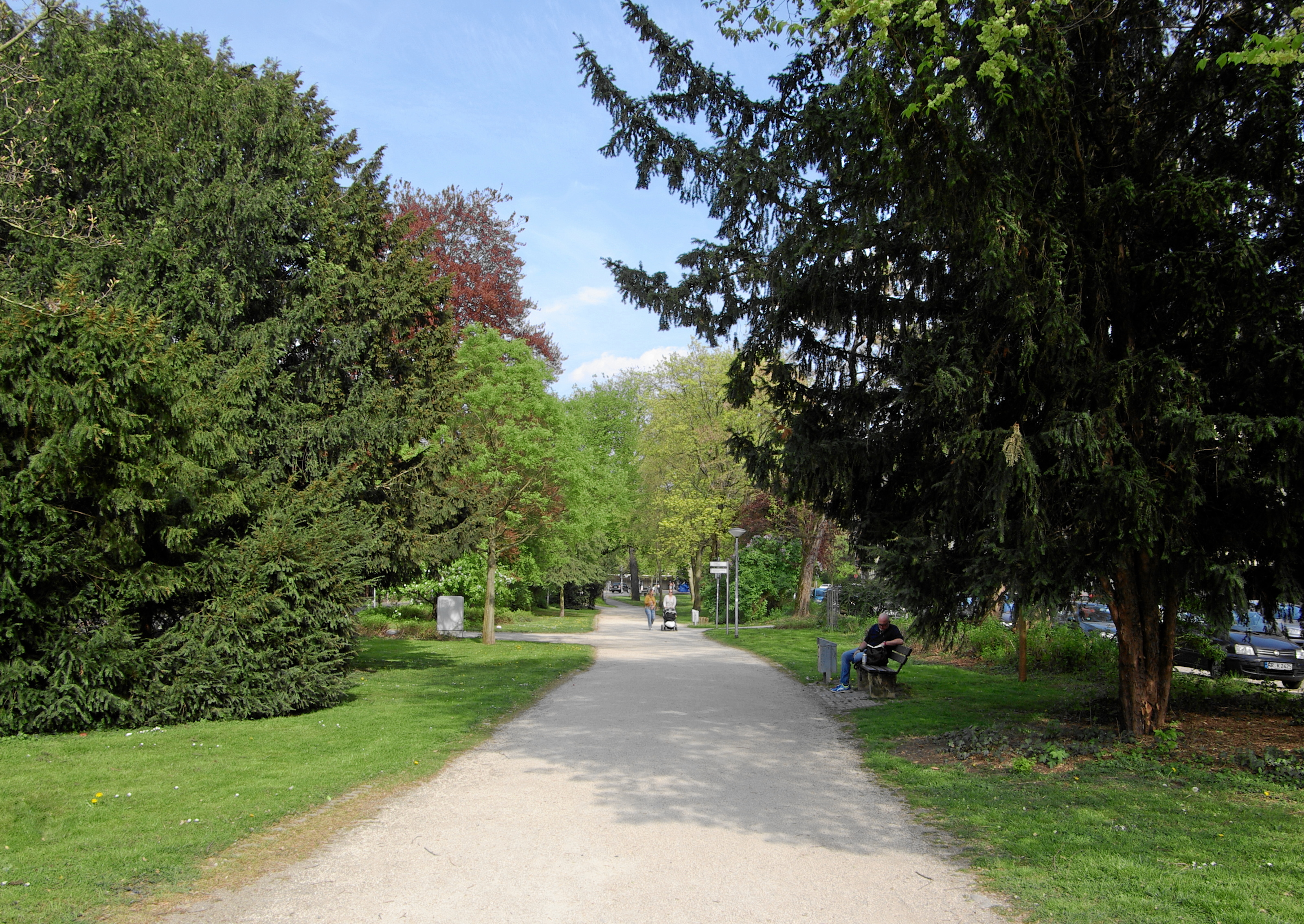 Trier, Grünanlage zwischen Friedrich-Ebert-Allee / Franz-Ludwig-Straße